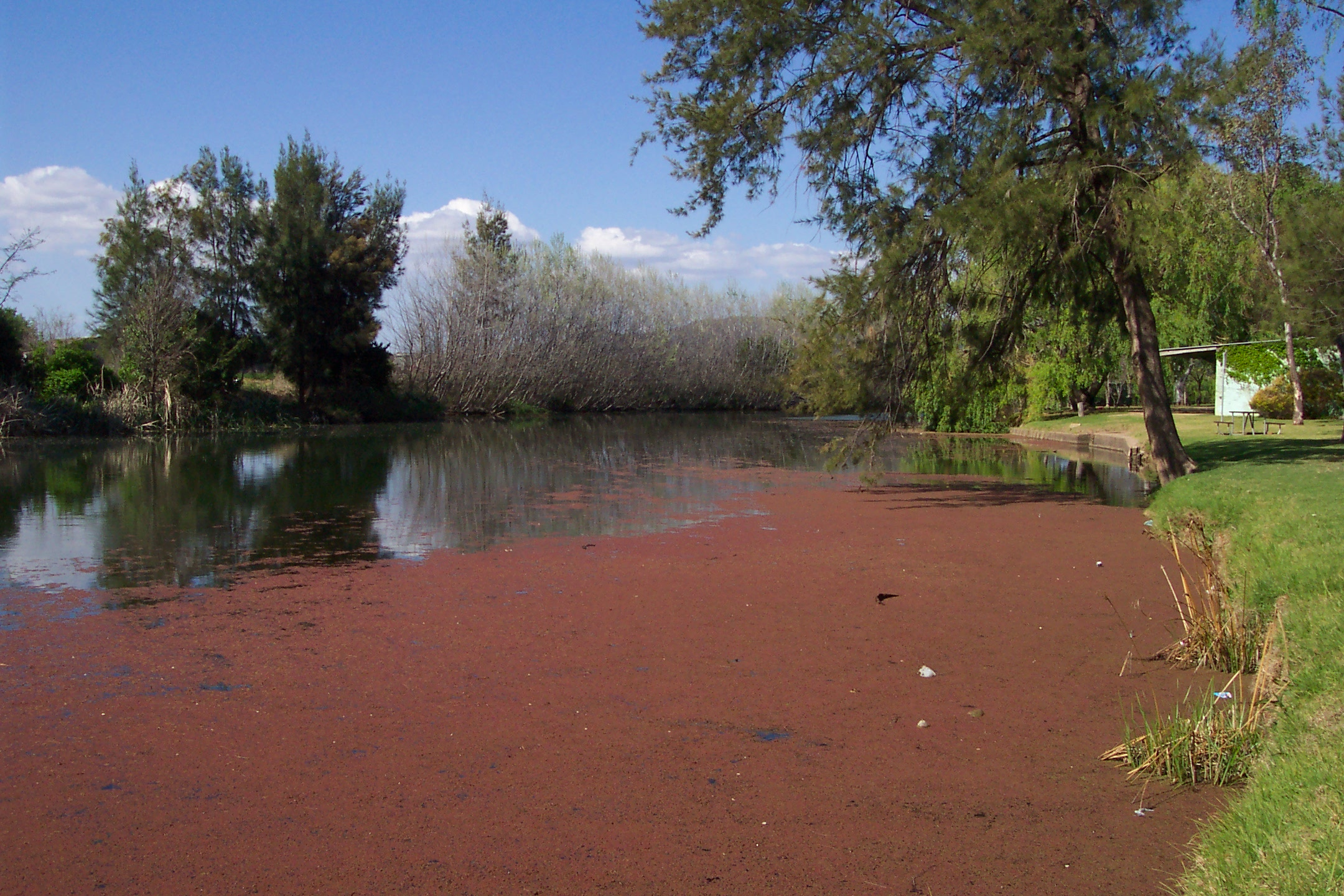 La Cudgegong, rivière de Nouvelle-Galles du Sud en Australie